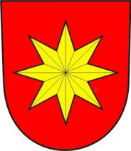 Znak obce Dvorce (okres Bruntál)